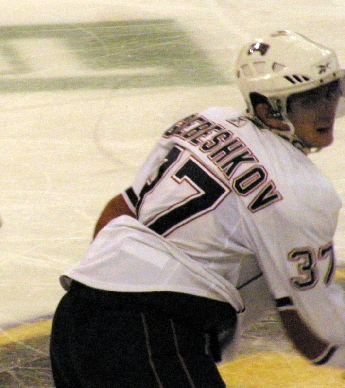 37 Denis Grebeshkov, Defenseman, Edmonton Oilers